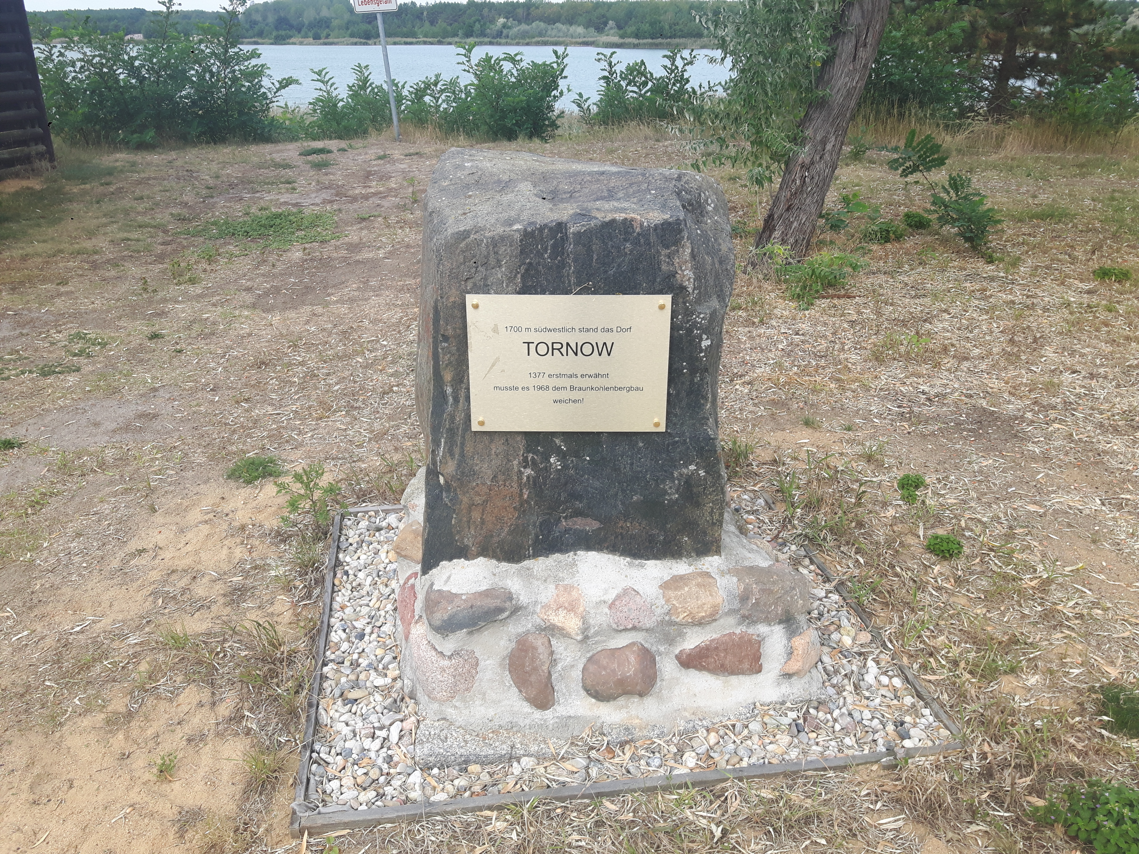 Gedenkstein für das devastierte Dorf Tornow in Lichtenau im brandenburgischen Landkreis Oberspreewald-Lausitz.